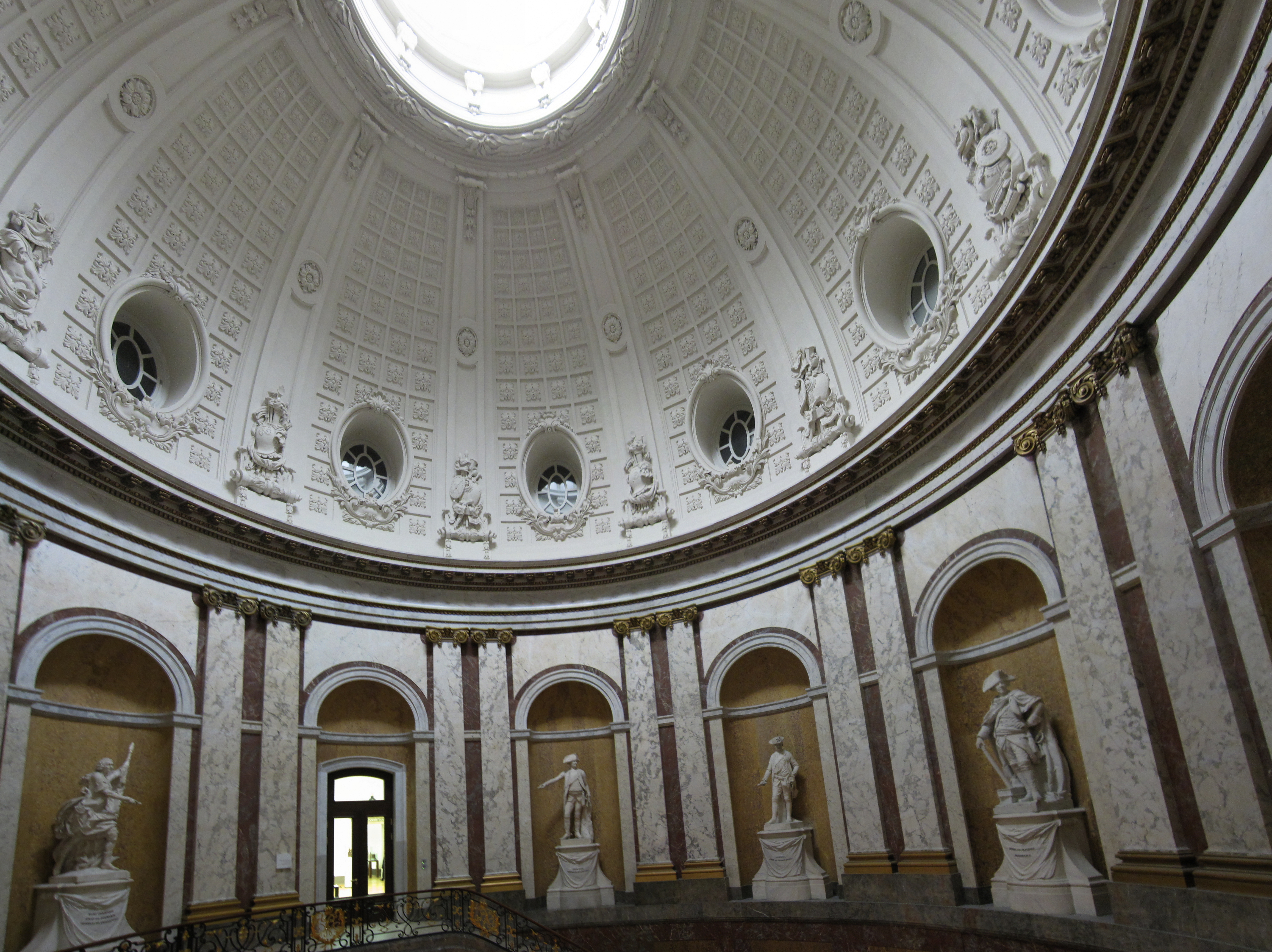 Bode-Museum panoramic view